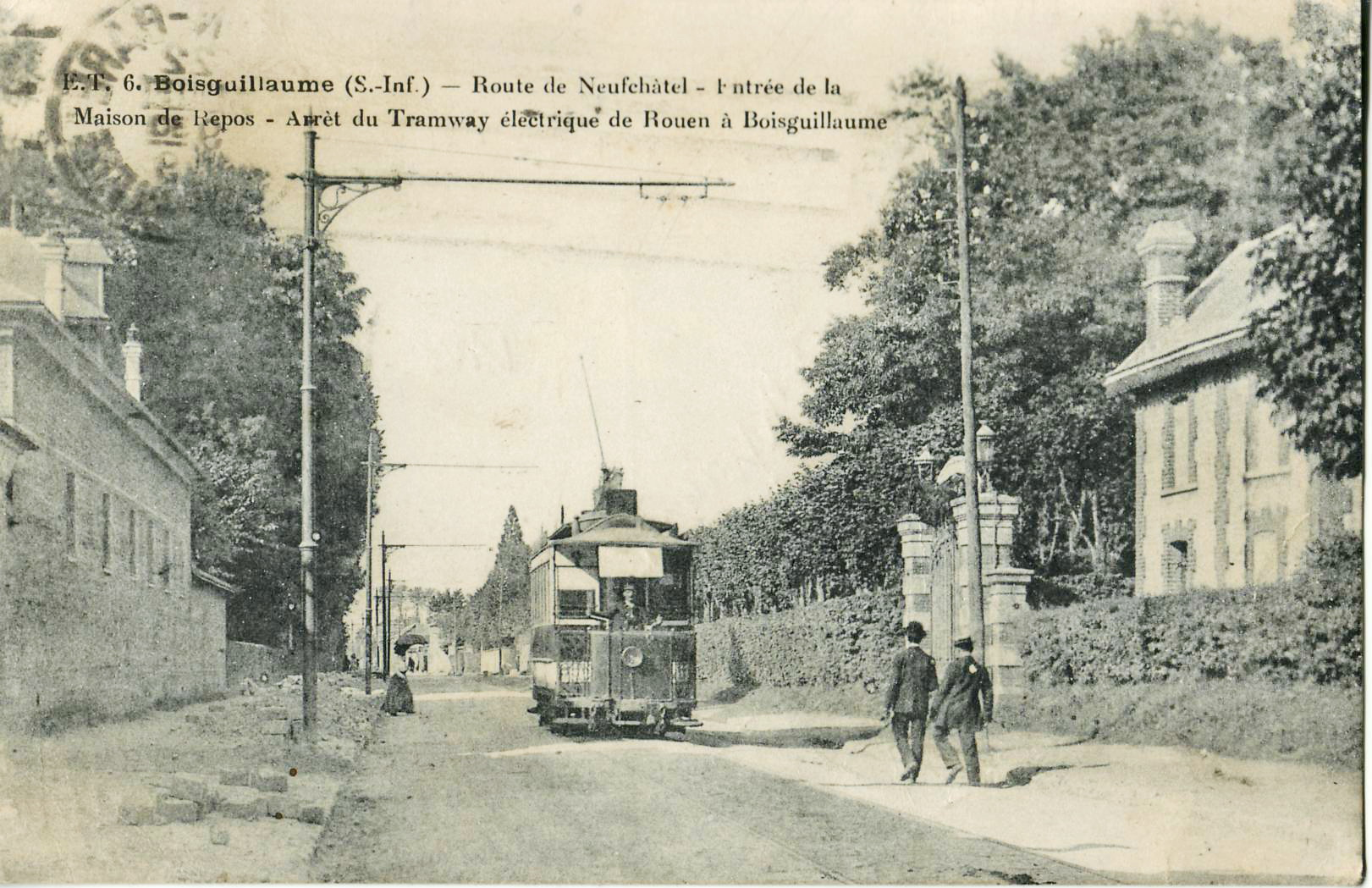 Carte postale ancienne éditée par ET n°6 : BOIS-GUILLAUME - Route de Neufchâtel - Entrée de la Maison de Repos - Arrêt du Tramway de Rouen à Boisguillaume